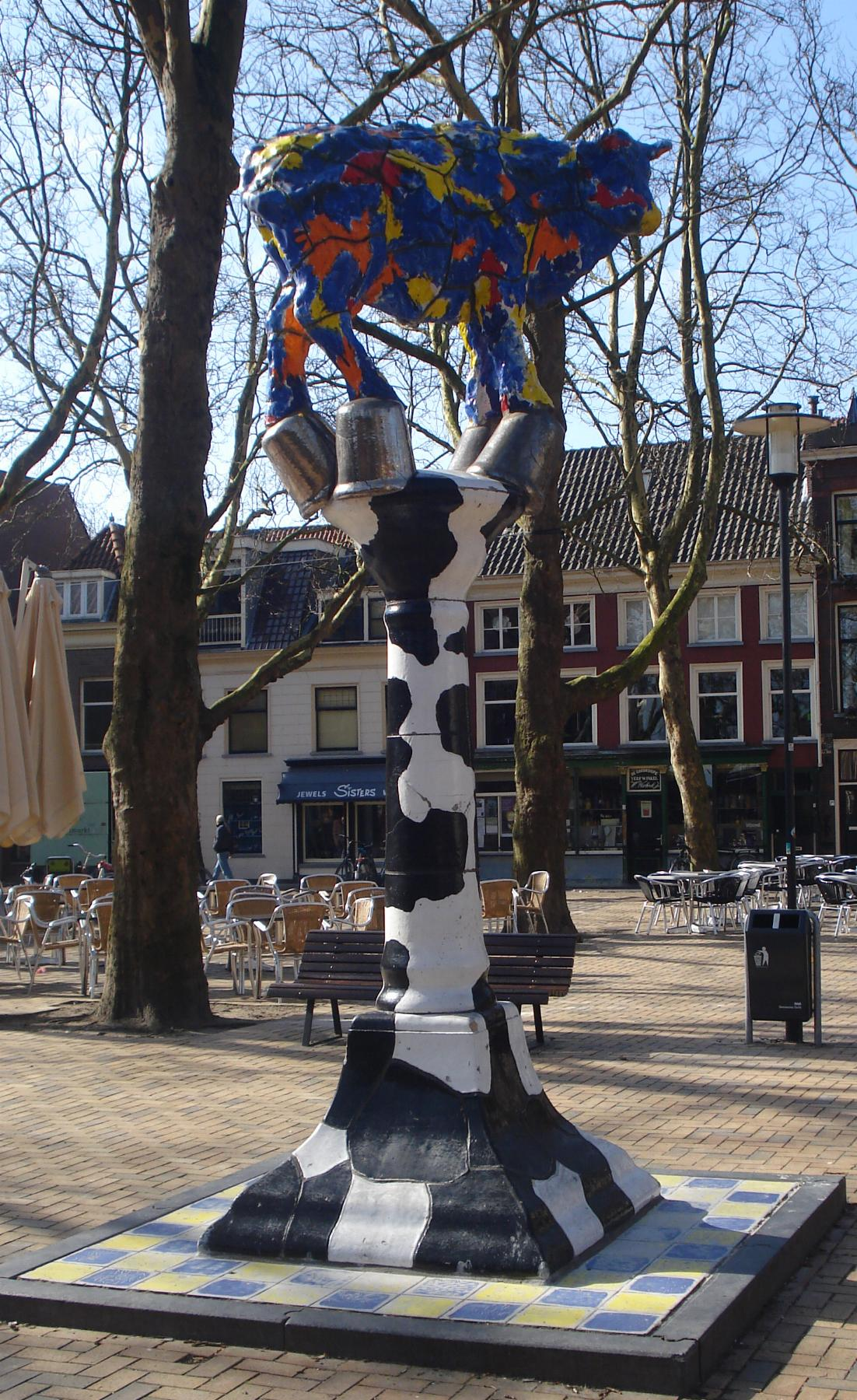 Delft, Beestenmarkt. Kunstwerk "Delftse Koe" van Rob Brandt. The Netherlands. The photographical reproduction of this work is covered under the article 18 of the Dutch copyright law, which states that “it is not an infringement of copyright to reproduce and publish pictures of a work, as meant in article 10, first paragraph, under 6°[1] or of an architectural work as meant in article 10, first paragraph, under 8°[2], which are made to be permanently located in a public place, as long as the work is depicted as it is located in the public space. Where incorporation of a work in a compilation is concerned, not more than a few of the works of the same author may be included”. [1] drawings, paintings, works of architecture and sculpture, lithographs, engravings and the likes [2] drafts, sketches and three-dimensional works relating to architecture, geography, topography or other sciences Note that photographs are not included in Item 6. They are separately listed at Item 9 and are therefore not covered by FOP. See COM:CRT/Netherlands#Freedom of panorama for more information. .